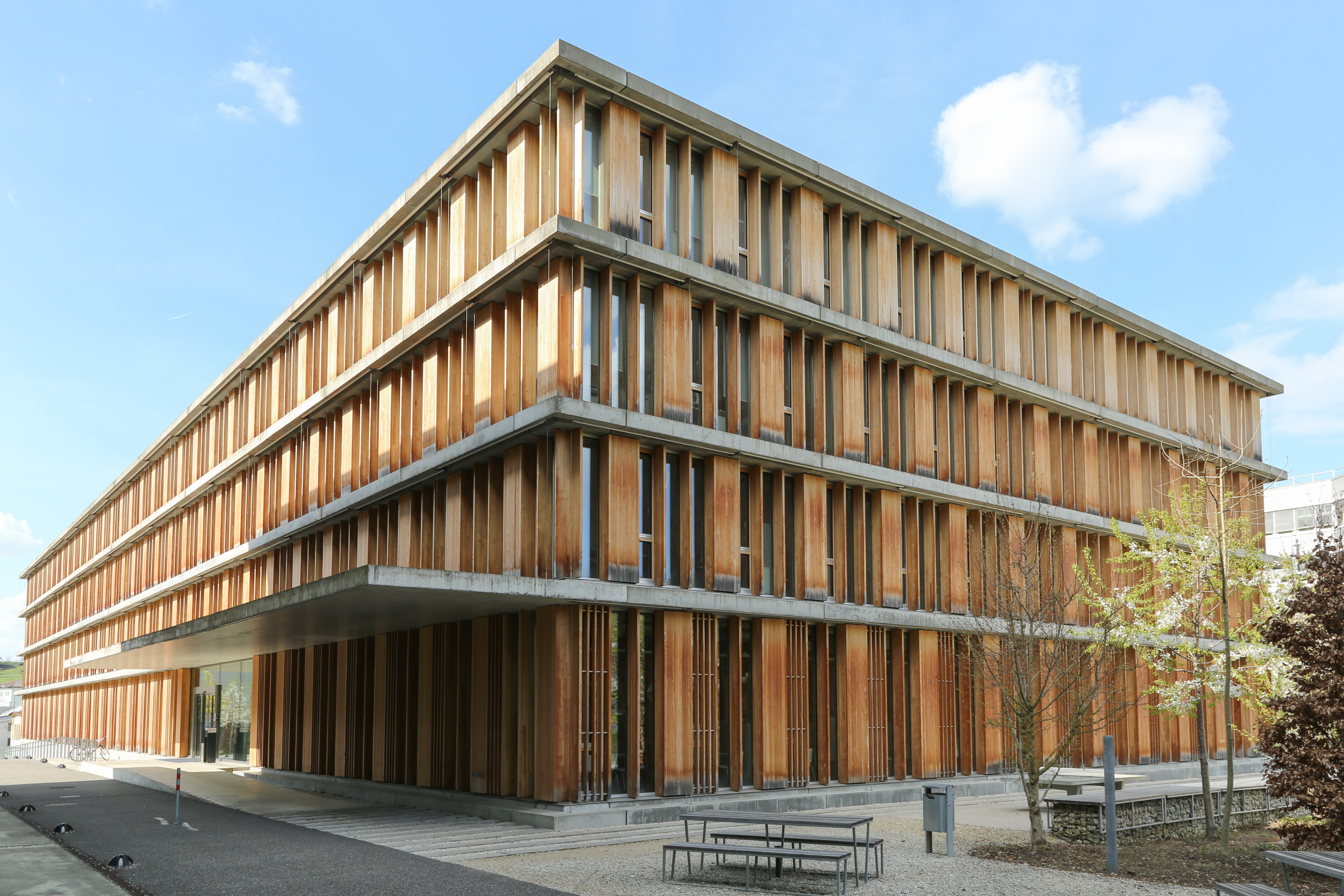 Bundesamt für Verkehr BAV in Ittigen, Ansicht aus südöstlicher Richtung